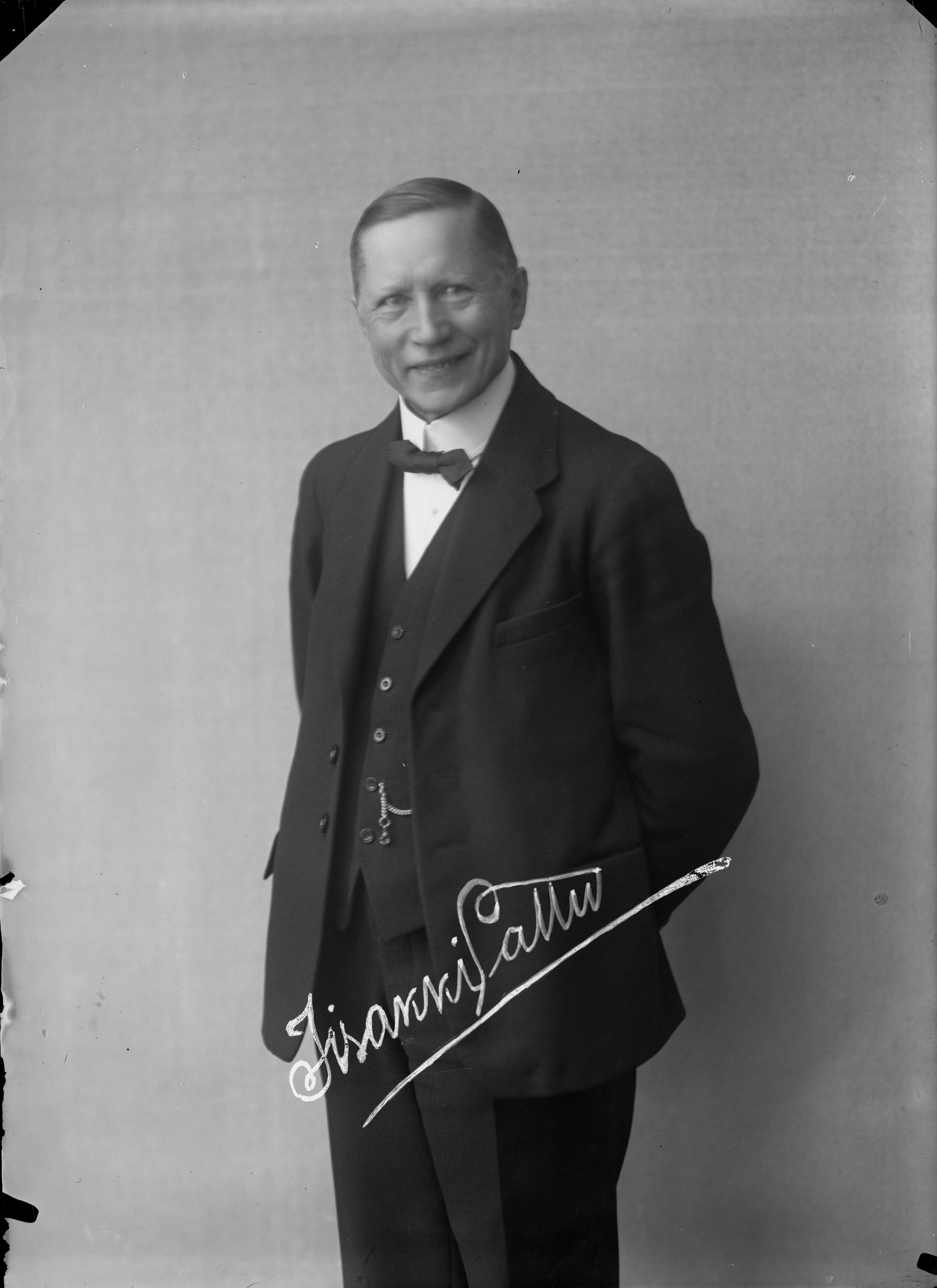 Iisakki Lattu